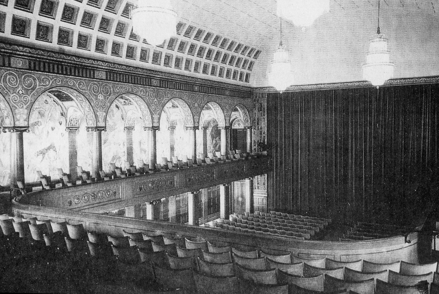 Biograf Palladiums salong